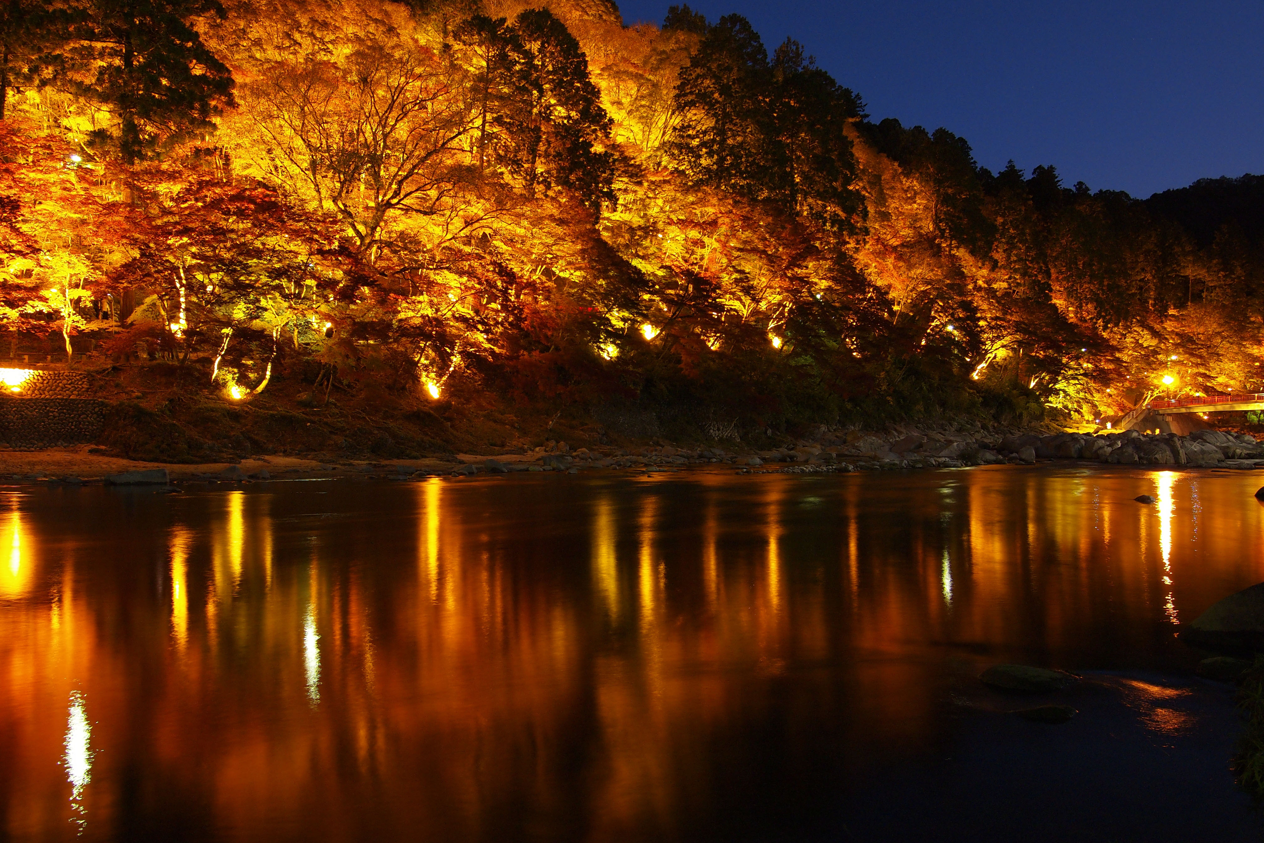 Kourankei was illuminated 香嵐渓のライトアップ